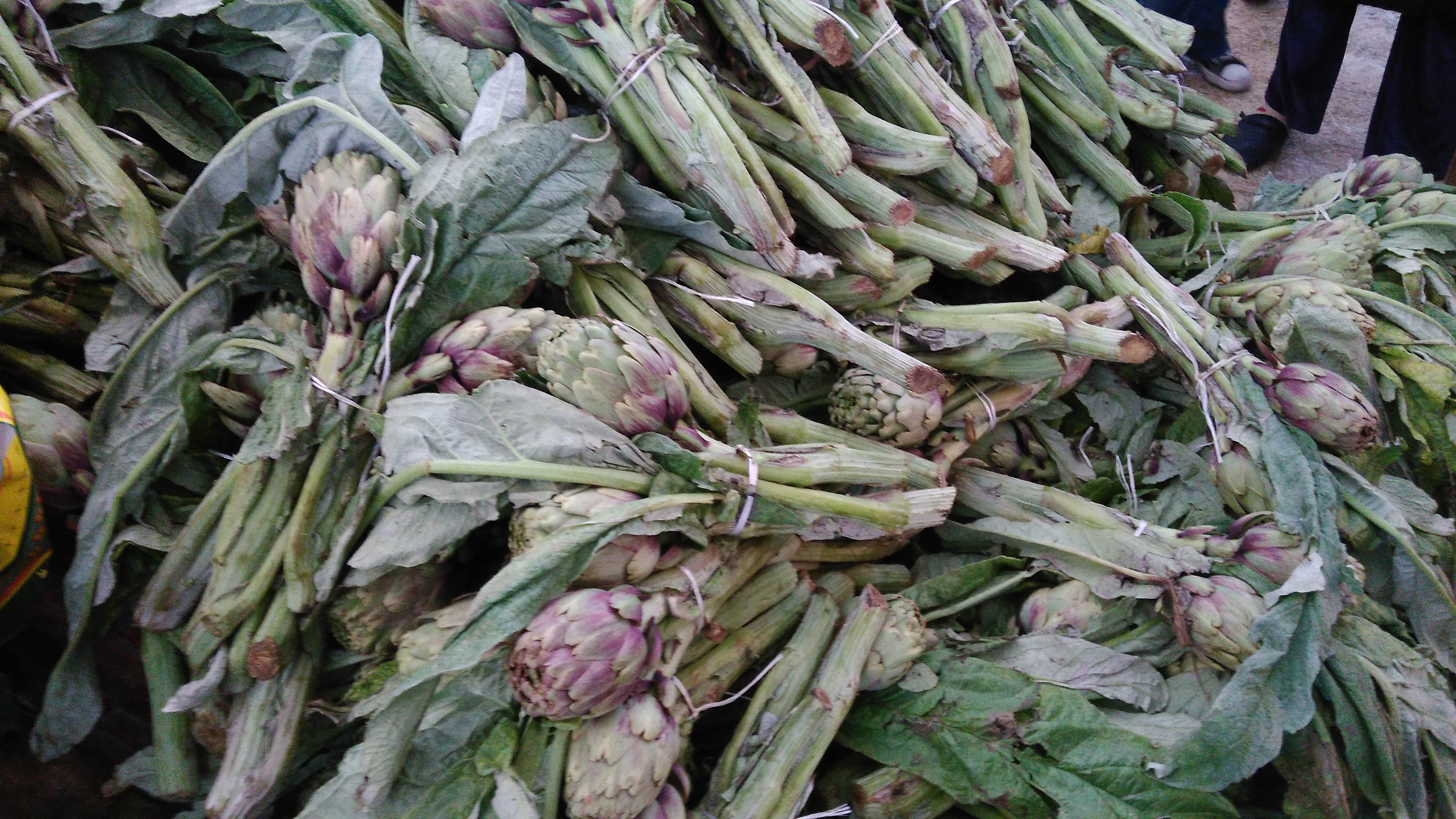 Les artichauts au marché (Monastir - Tunisie), vendu en pack de 3 à environ 0,50€. Préparés généralement en les faisant cuir dans de l'eau avec une pincée de sel et une tranche de citron.